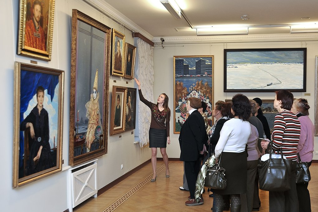 Экскурсия в галерее Глазунова